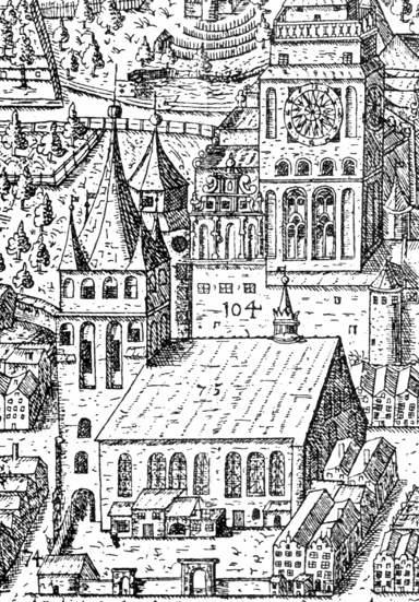 Stary kościół farny w Królewcu na fragmencie panoramy z 1613 r.